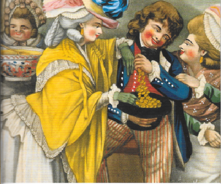 A Rich Privateer Brought Safe into Port, by Two First Rates, d'après Dighton.